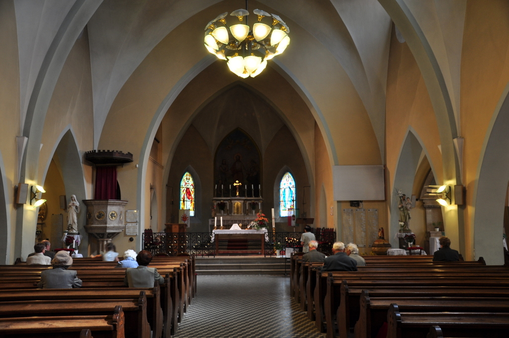 Roman Catholic church in Pestújhely